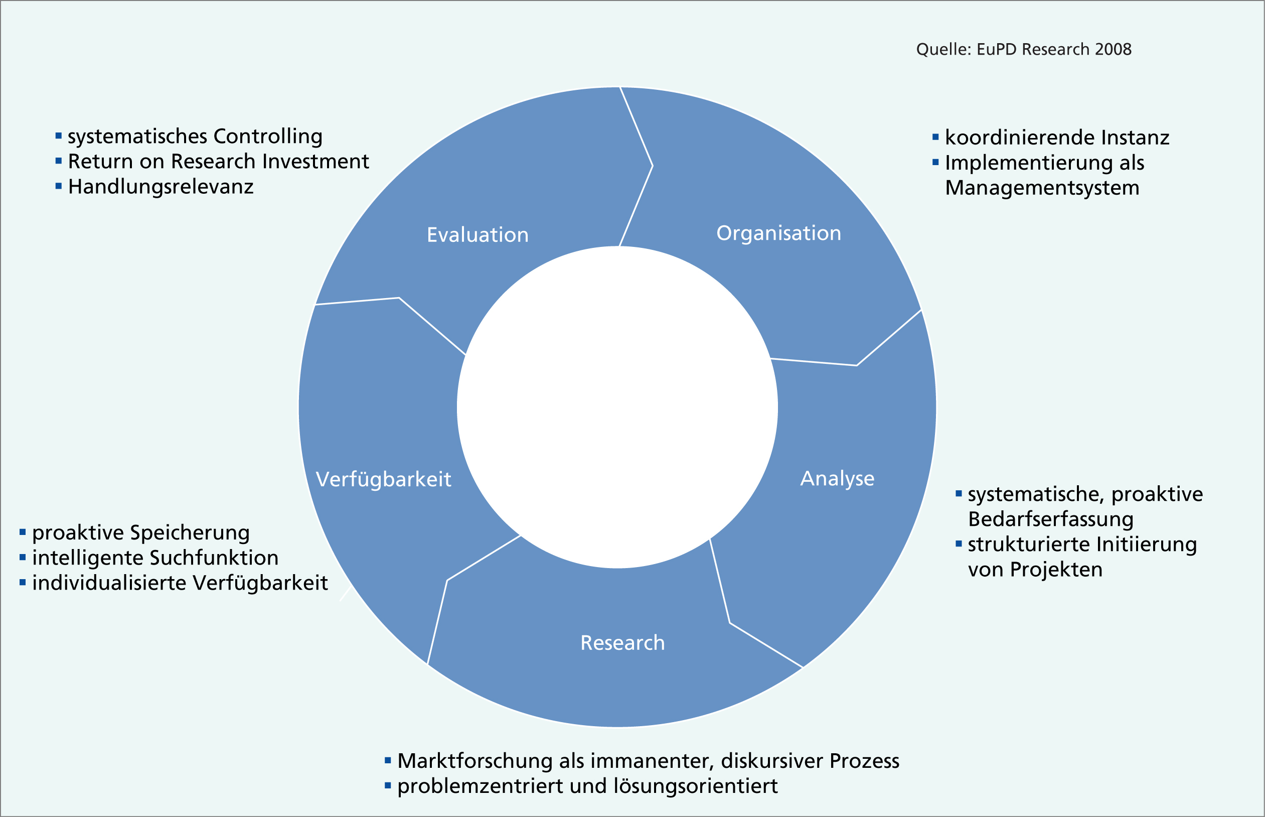 Evolutionsstufen betrieblicher Marktforschung